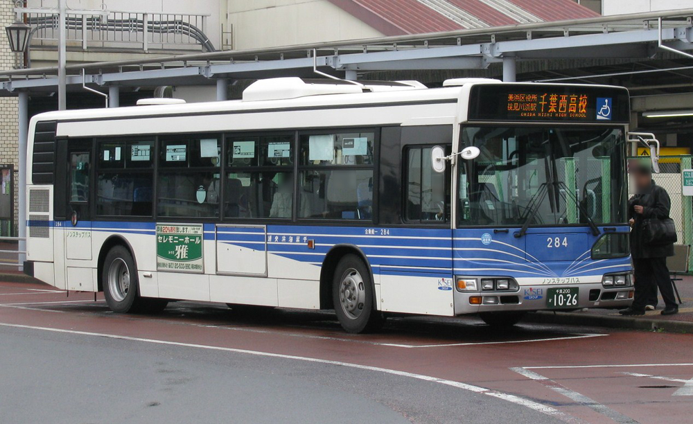 千葉海浜交通 日野KL-HU2PPEE